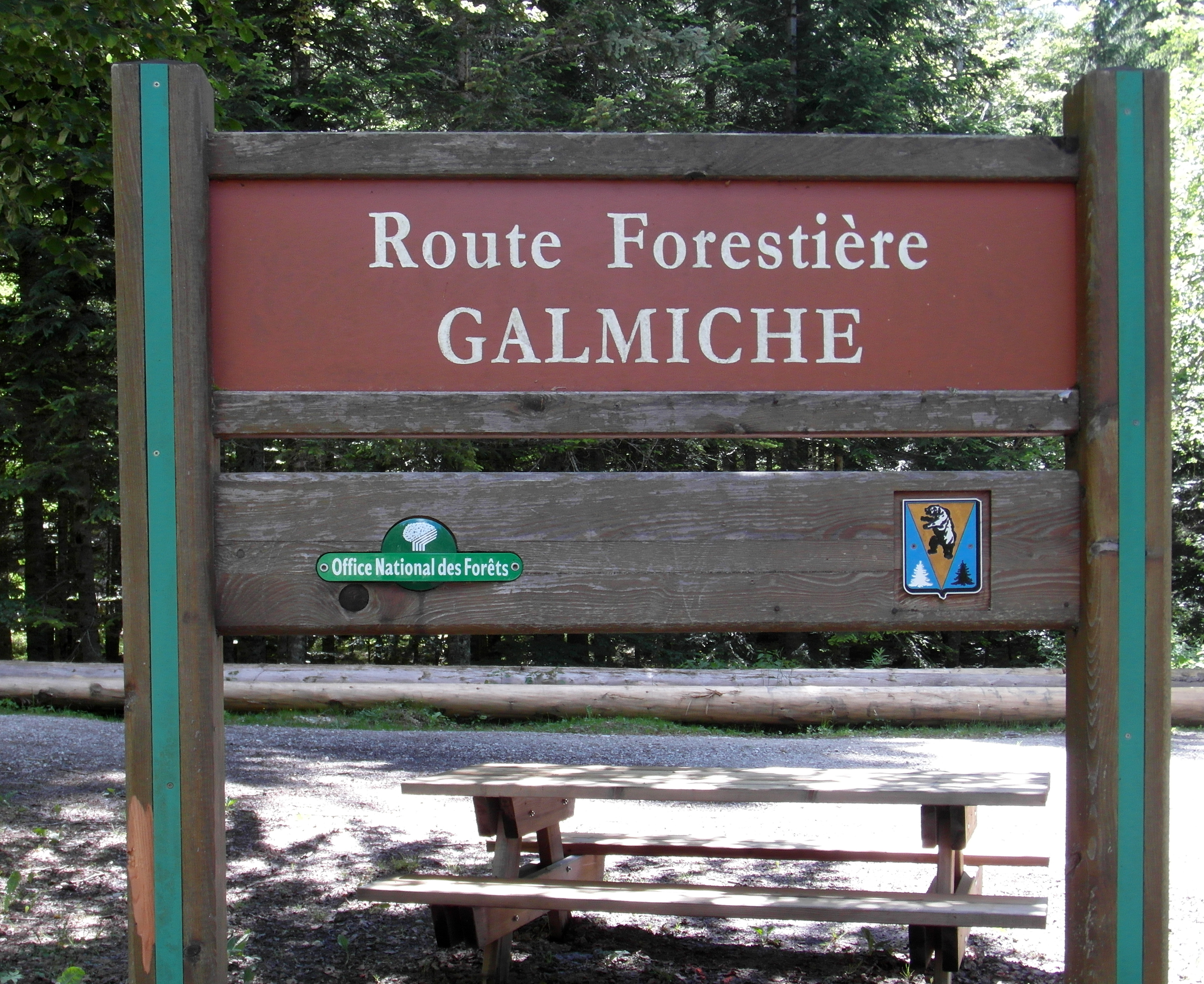 Foret de Villard, route de Galmiche